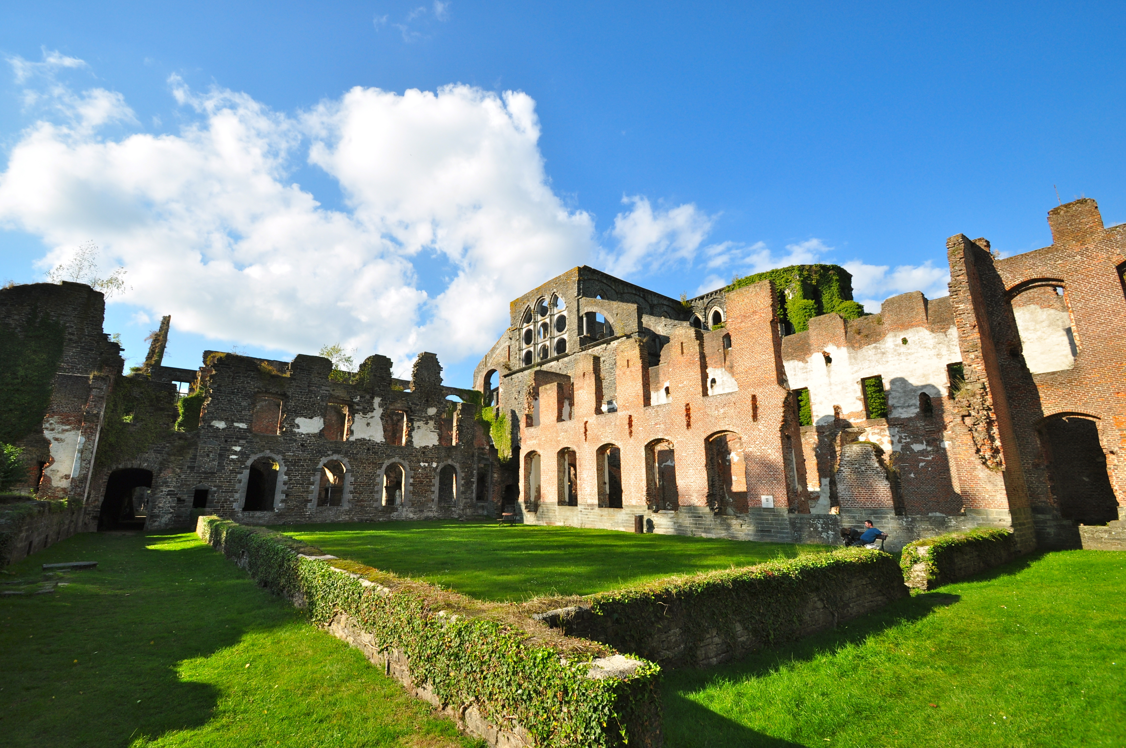 Les ruines de l'abbaye de Villers-la-Ville (M) et les terrains environnants (S)